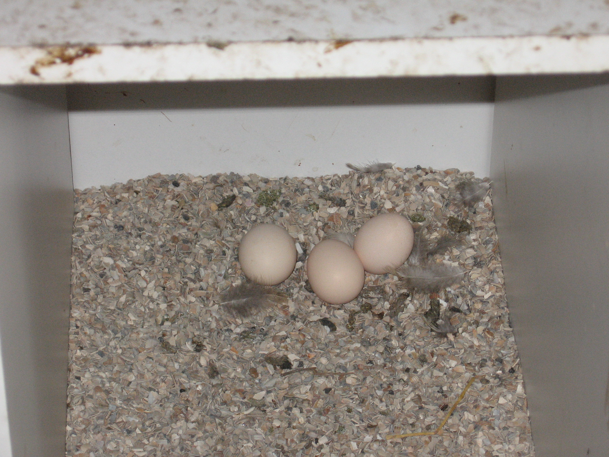 dit is een plaatje van eieren in ee legbak zlef gemaakt in het kippen hok